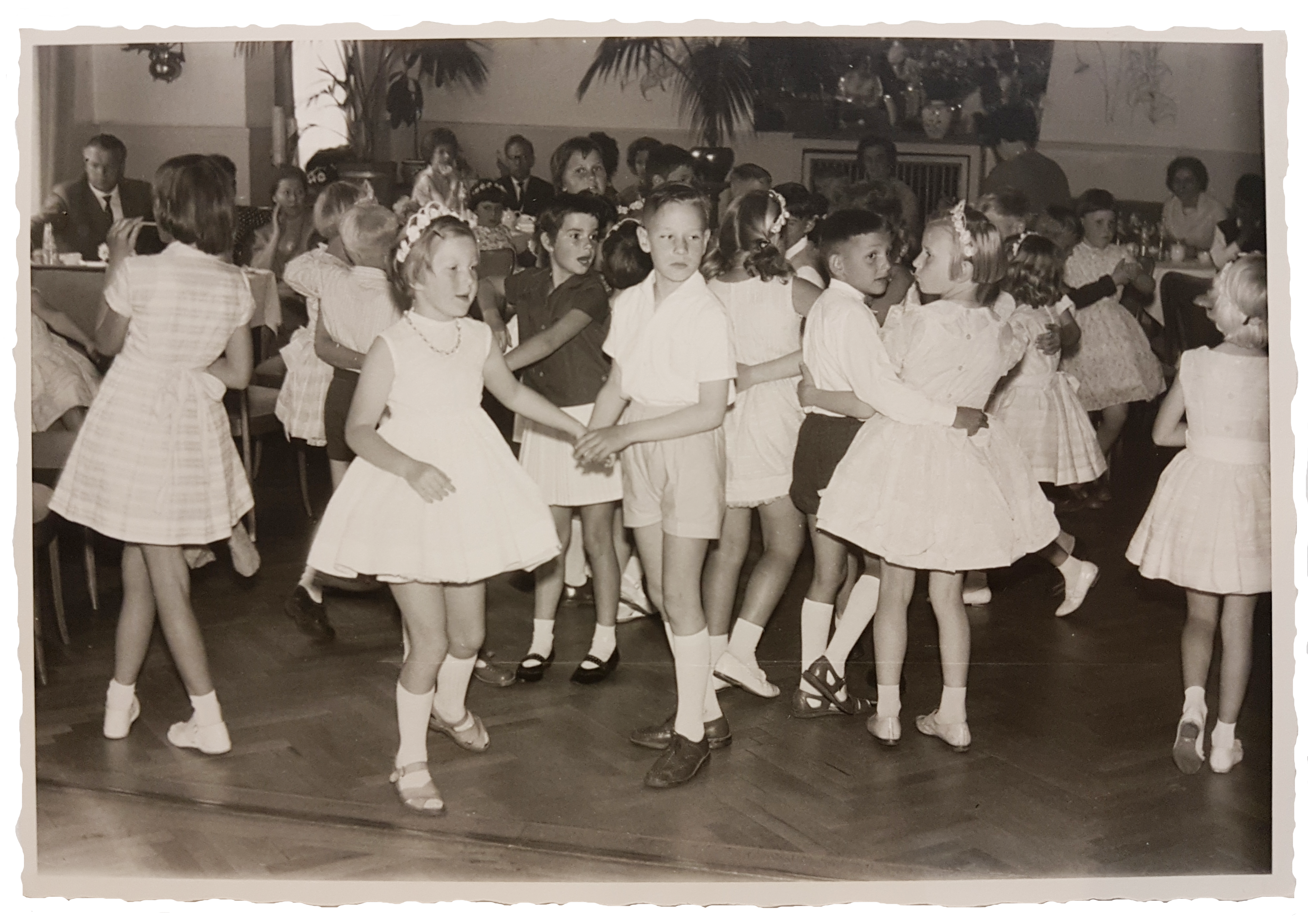 Zu beliebten Kinderliedern tanzten die Kinder eingeübte Choreographien